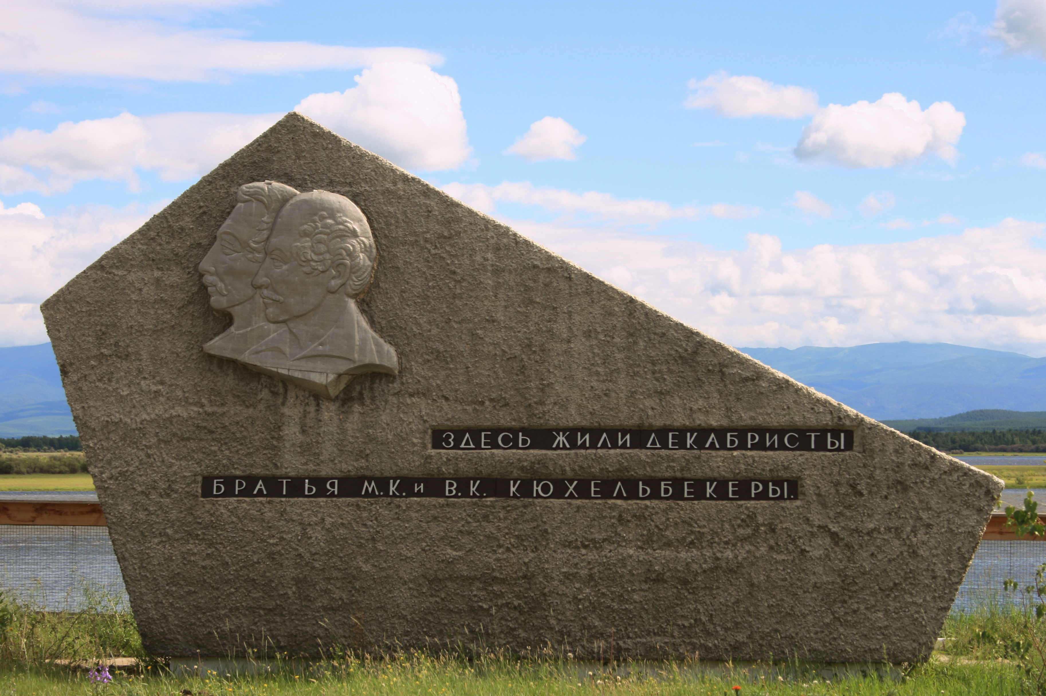 Памятник братьям-декабристам М.К. и В.К. Кюхельбекерам. Село Баргузин, Баргузинский район, Бурятия